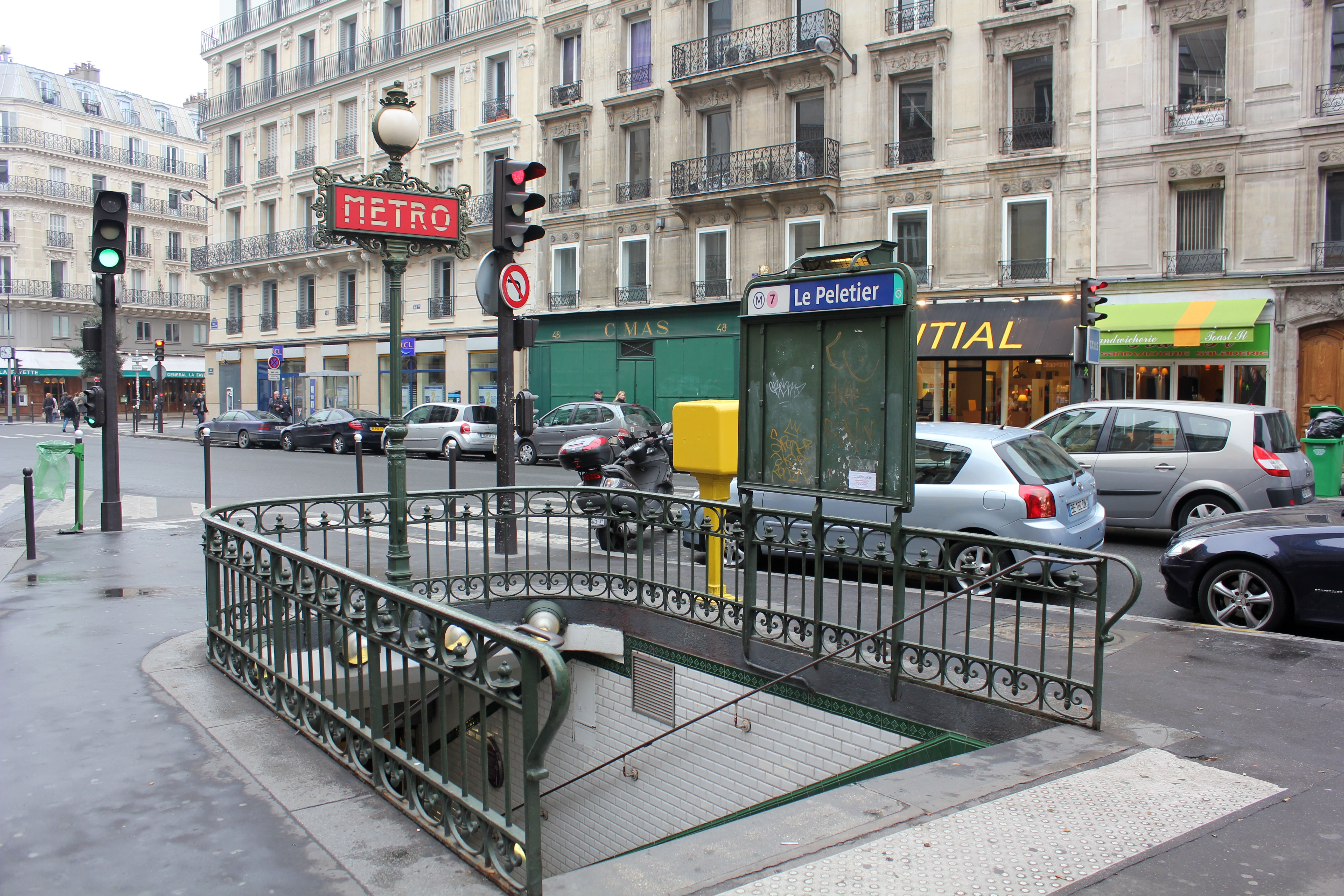 Paris Metro 7 Le Peletier Eingang